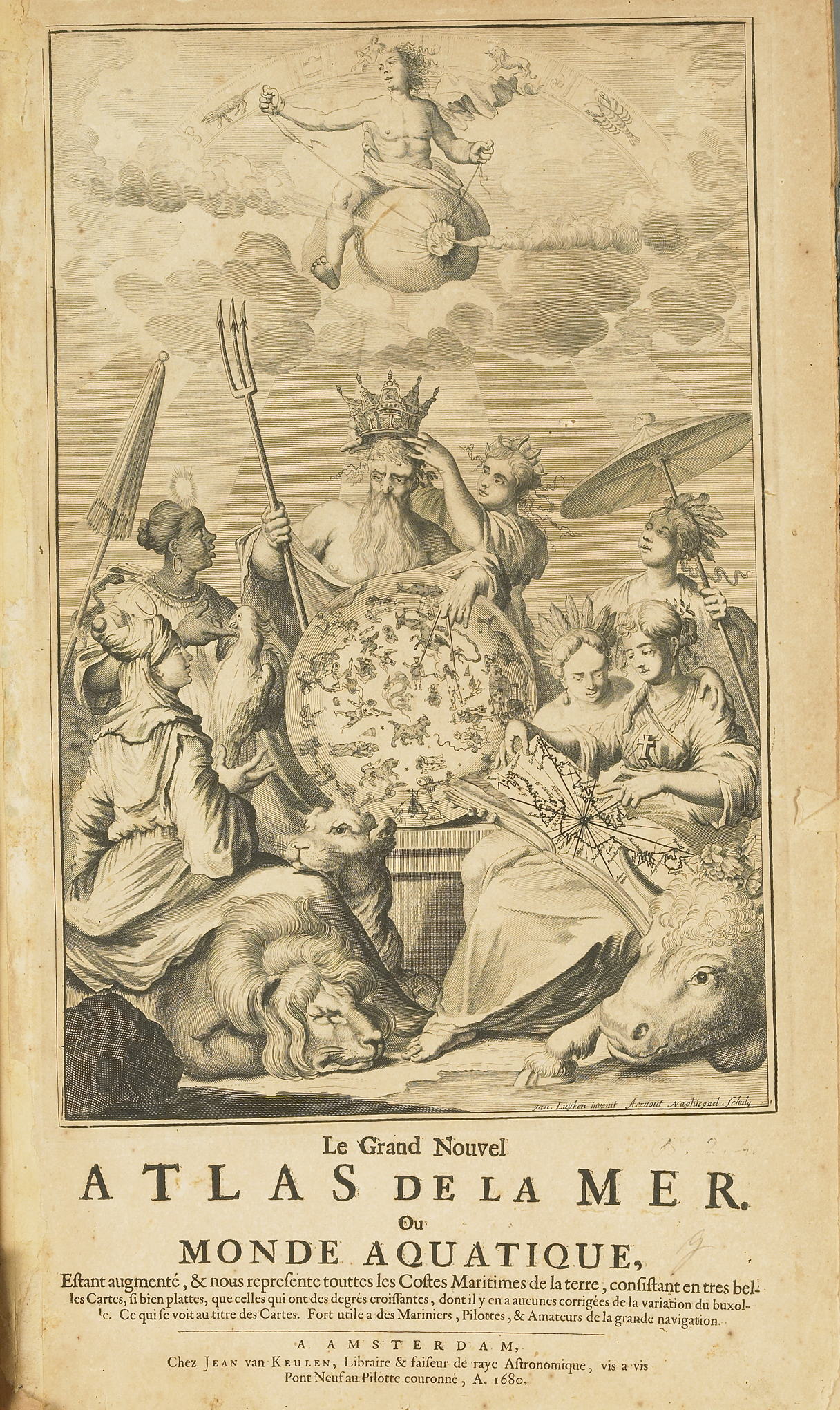 Titelblad van een franstalige atlas met 40 kaarten